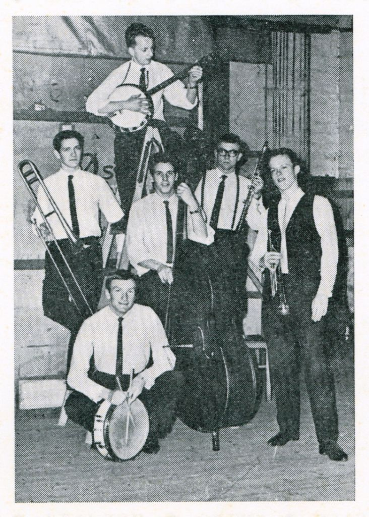 Traditional Danish jazz band, named Don Fjeldes Jazzband, in 1963.